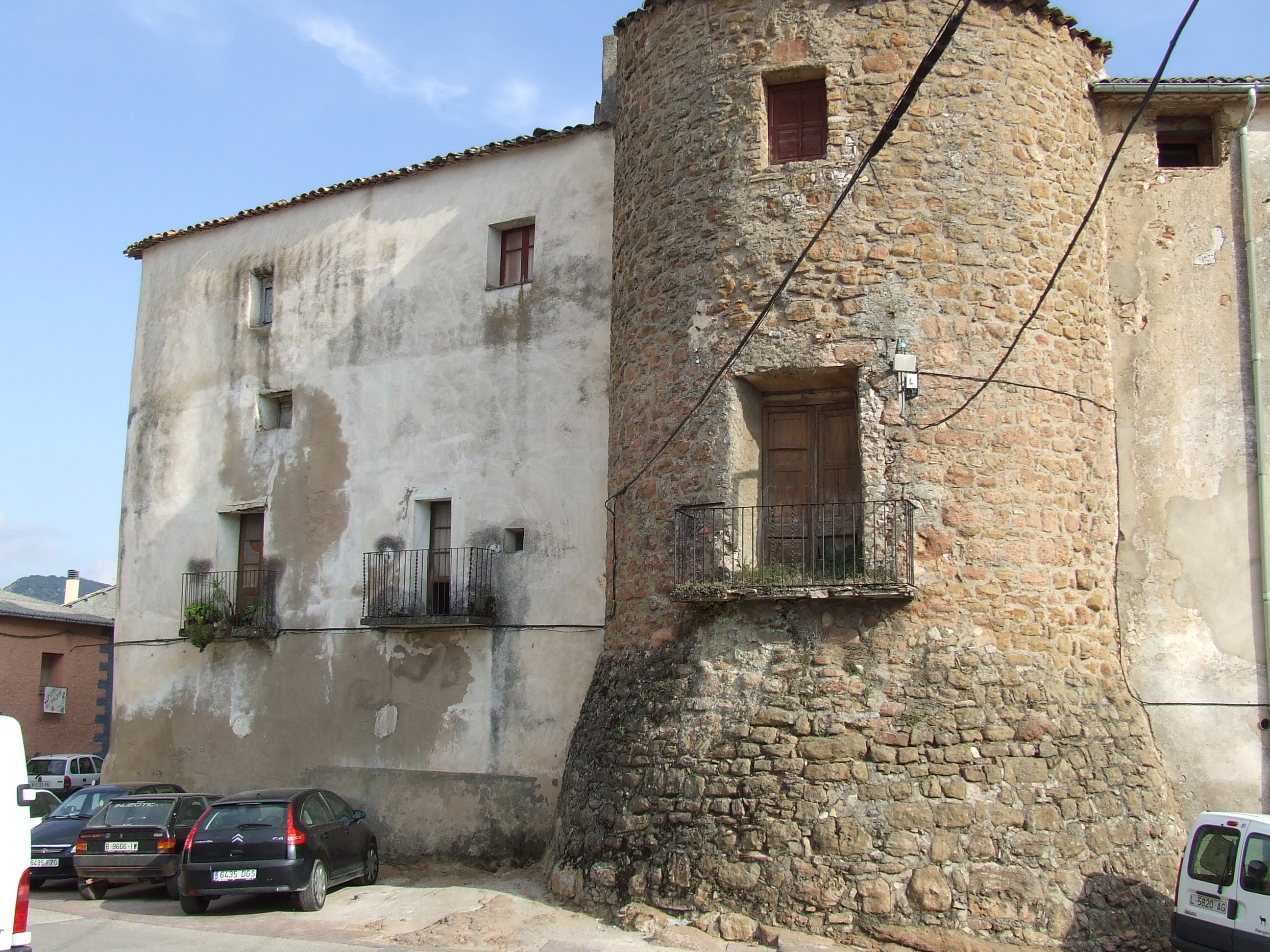 Torre de Caps (Talarn, Pallars Jussà)